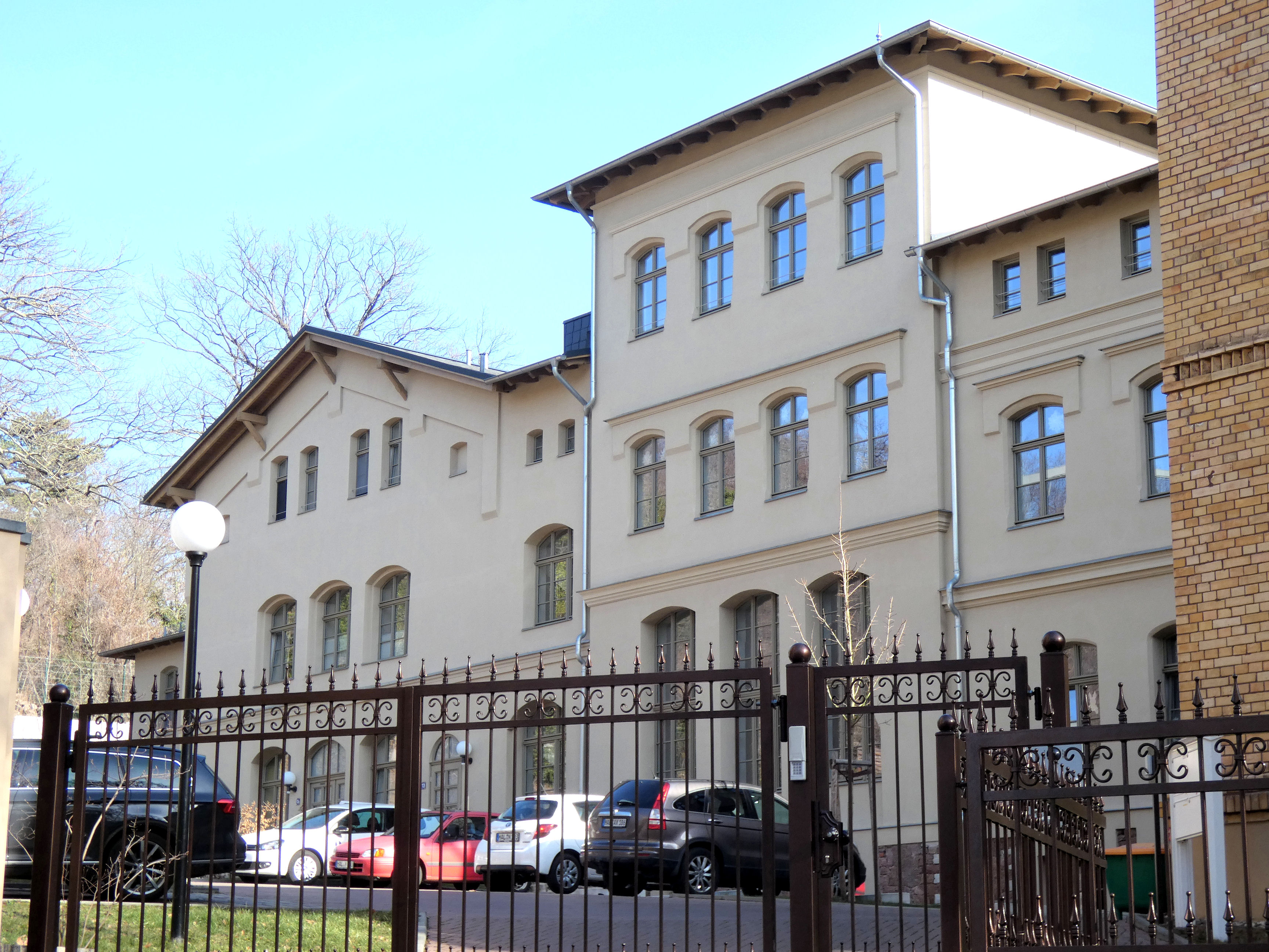 Solbad Wittekind, Gesellschaftshaus, erb. 1855, Architekt Friedrich August Stüler, Wittekindstraße, Halle (Saale)